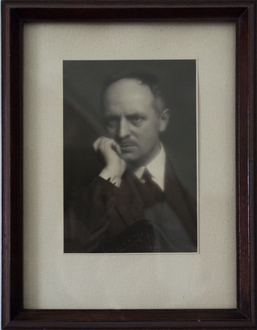 Copia del ritratto fotografico di Francesco Ferrario ad opera di Emilio Sommariva. 1925-26